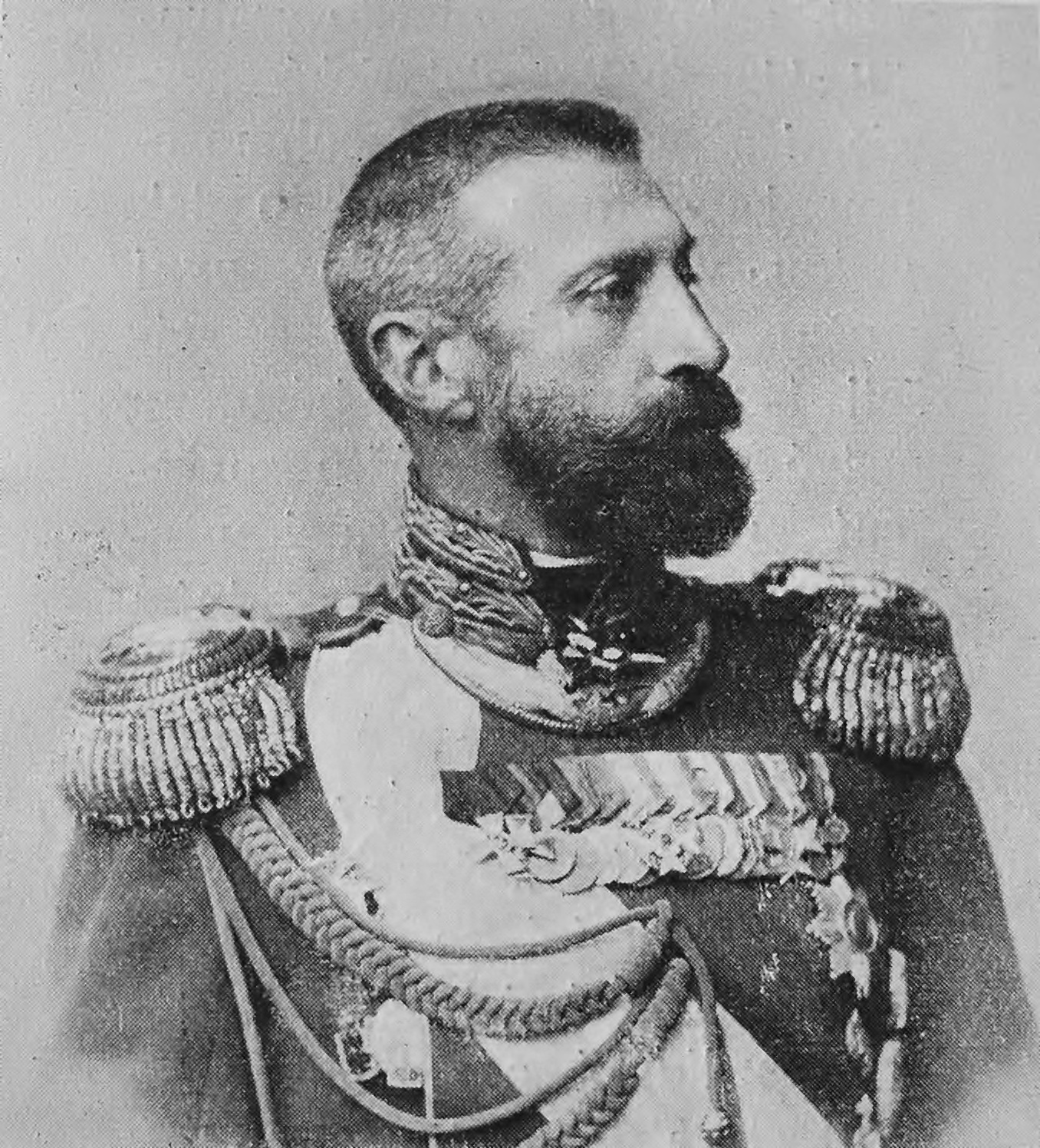 Portrét Konstantin Konstantinovič